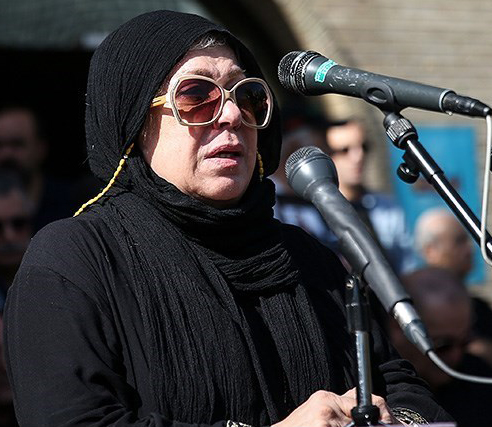 زهره شکوفنده ۲۲ شهريور ۱۳۹۷